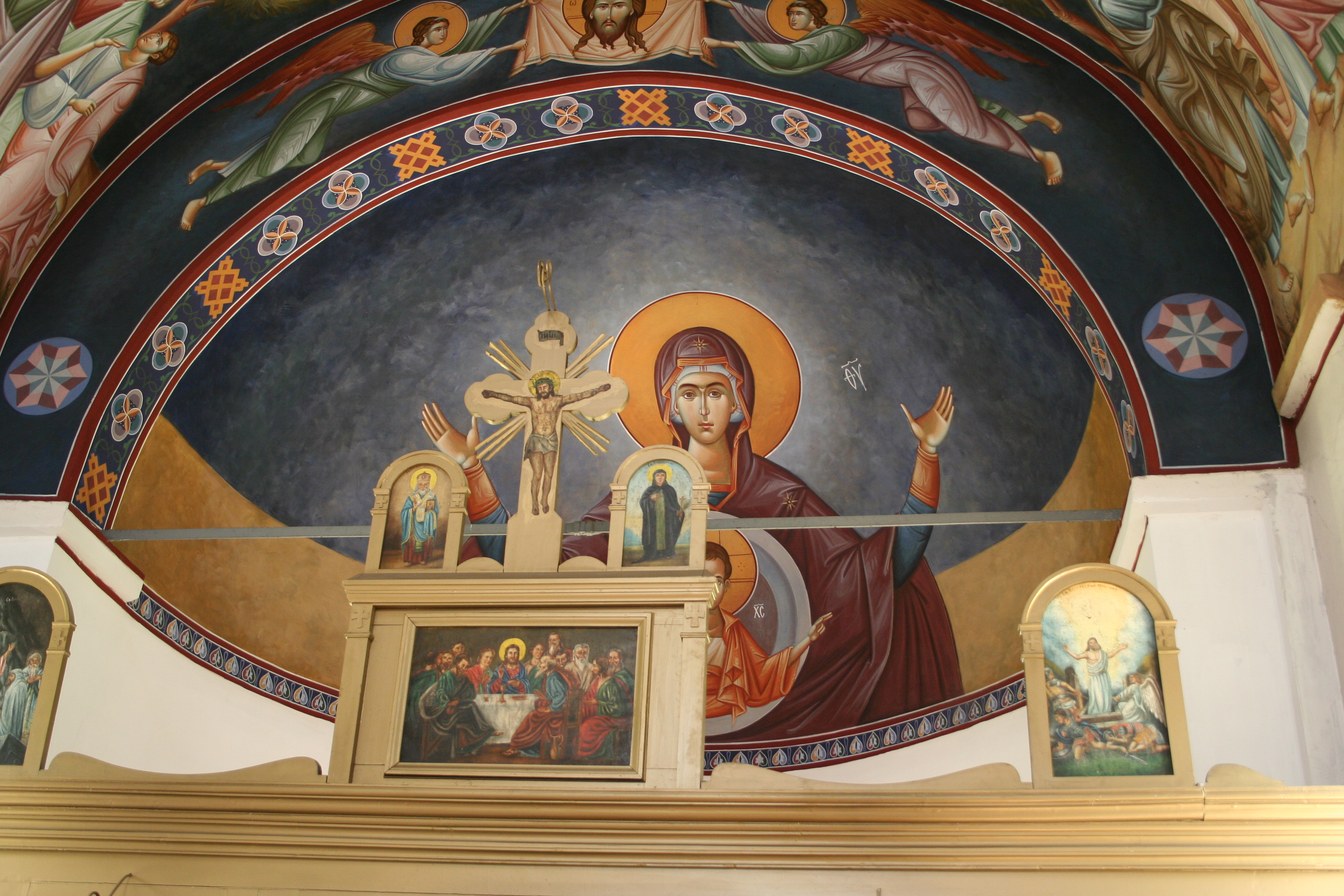 Crkva Sv. Georgija, Mojković